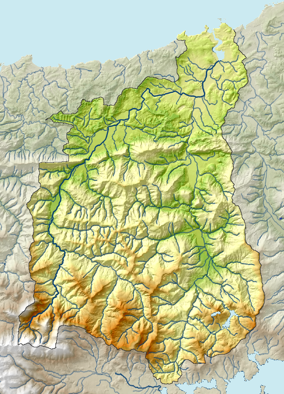 Mapa físico de la cuenca del río Saja (Cantabria)